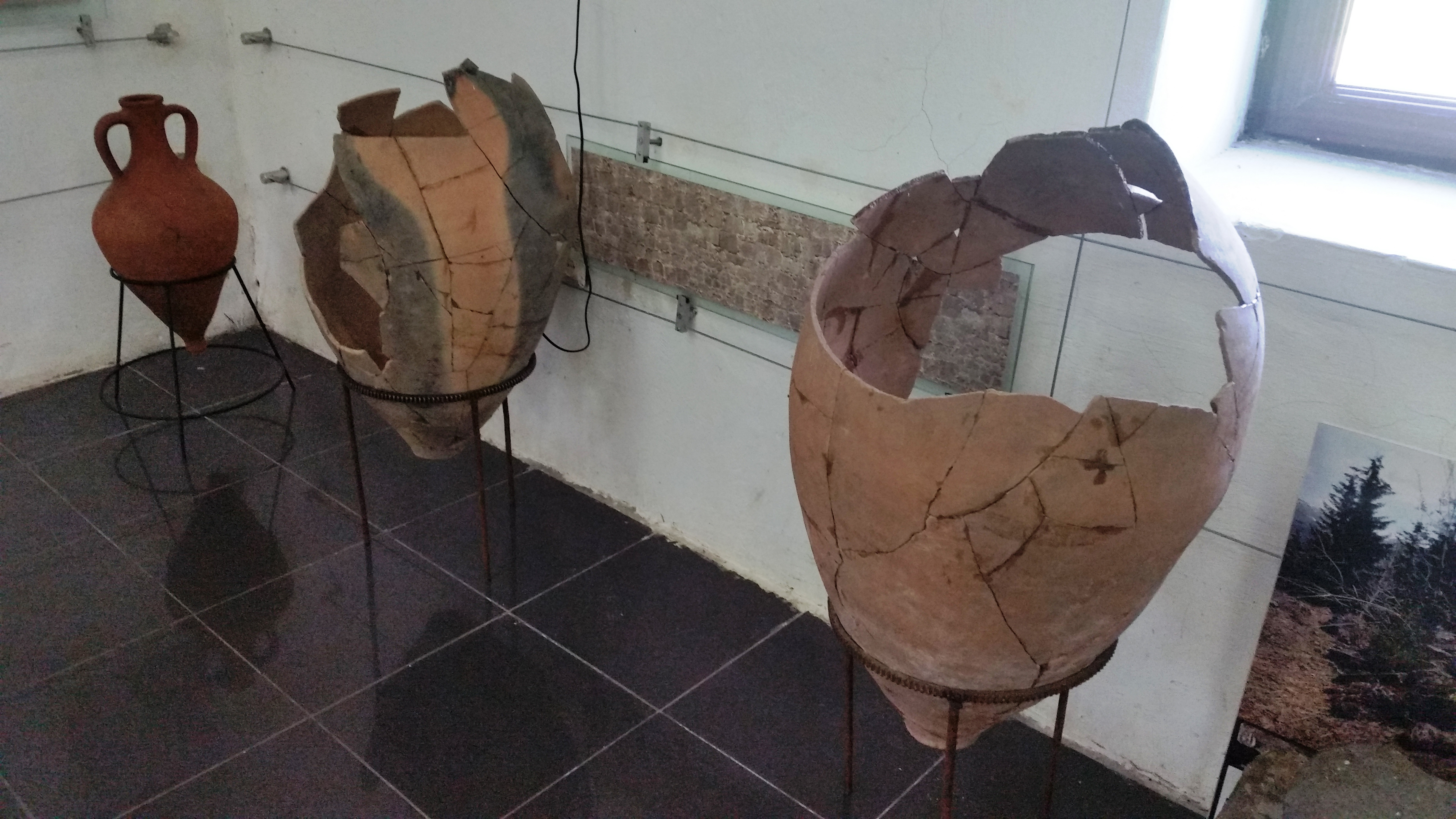 უძველესი ჭურების გონიოს ციხის მუზეუმში